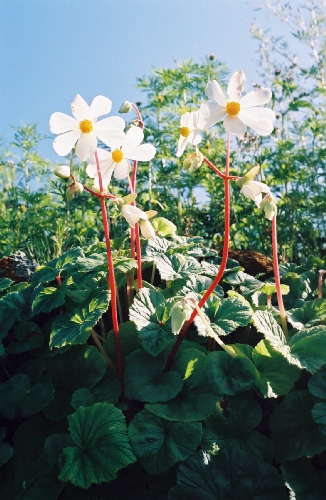 Begonia octopetala L'Héritier - Domaine les Vaux de Pitunilla (Parinacochas, Ayacucho, Pérou) 3000 m d'altitude. Février 2006.